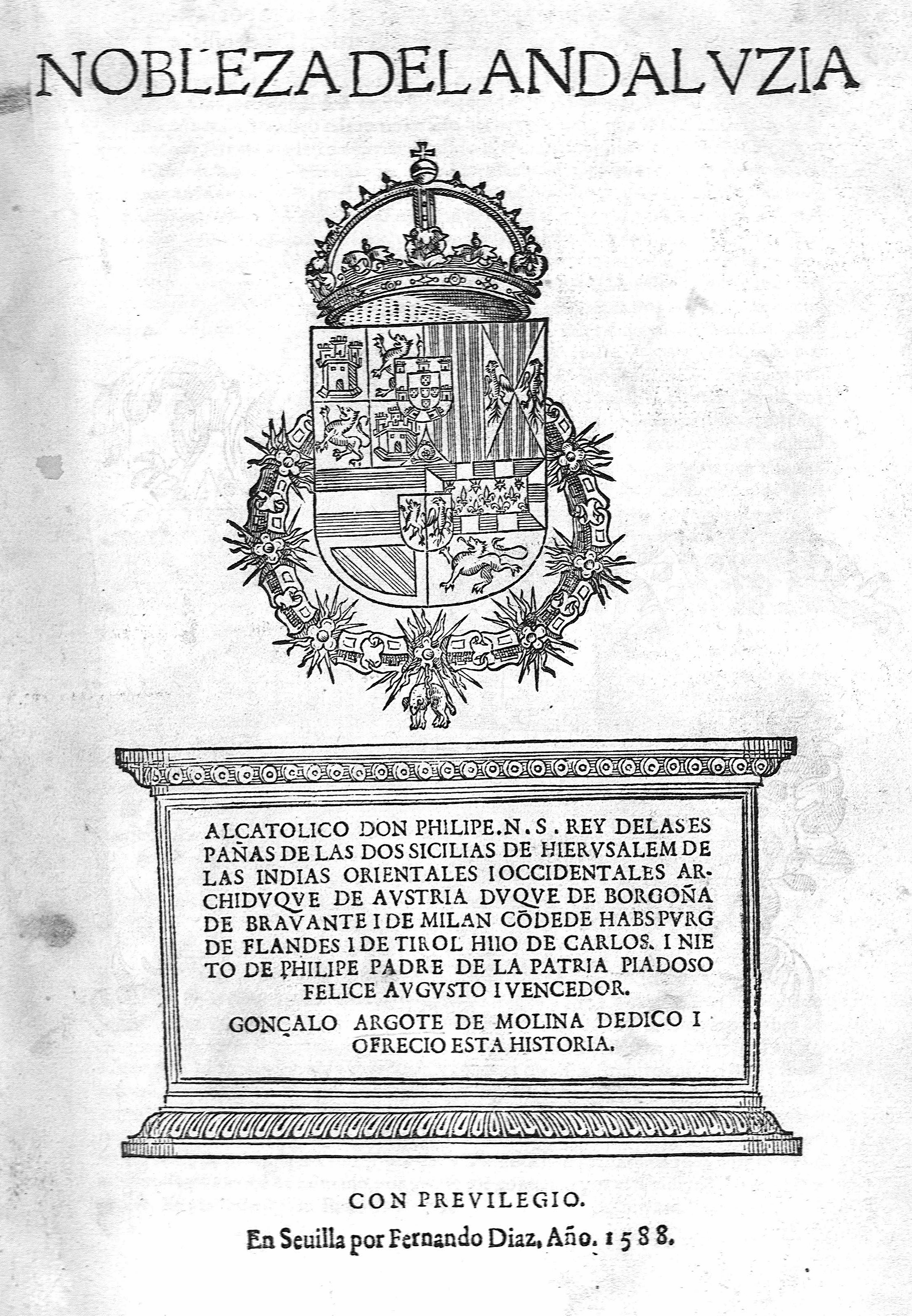 Gonzalo Argote de Molina, Nobleza del Andaluzia, Sevilla, Fernando Díaz, 1588, portada.